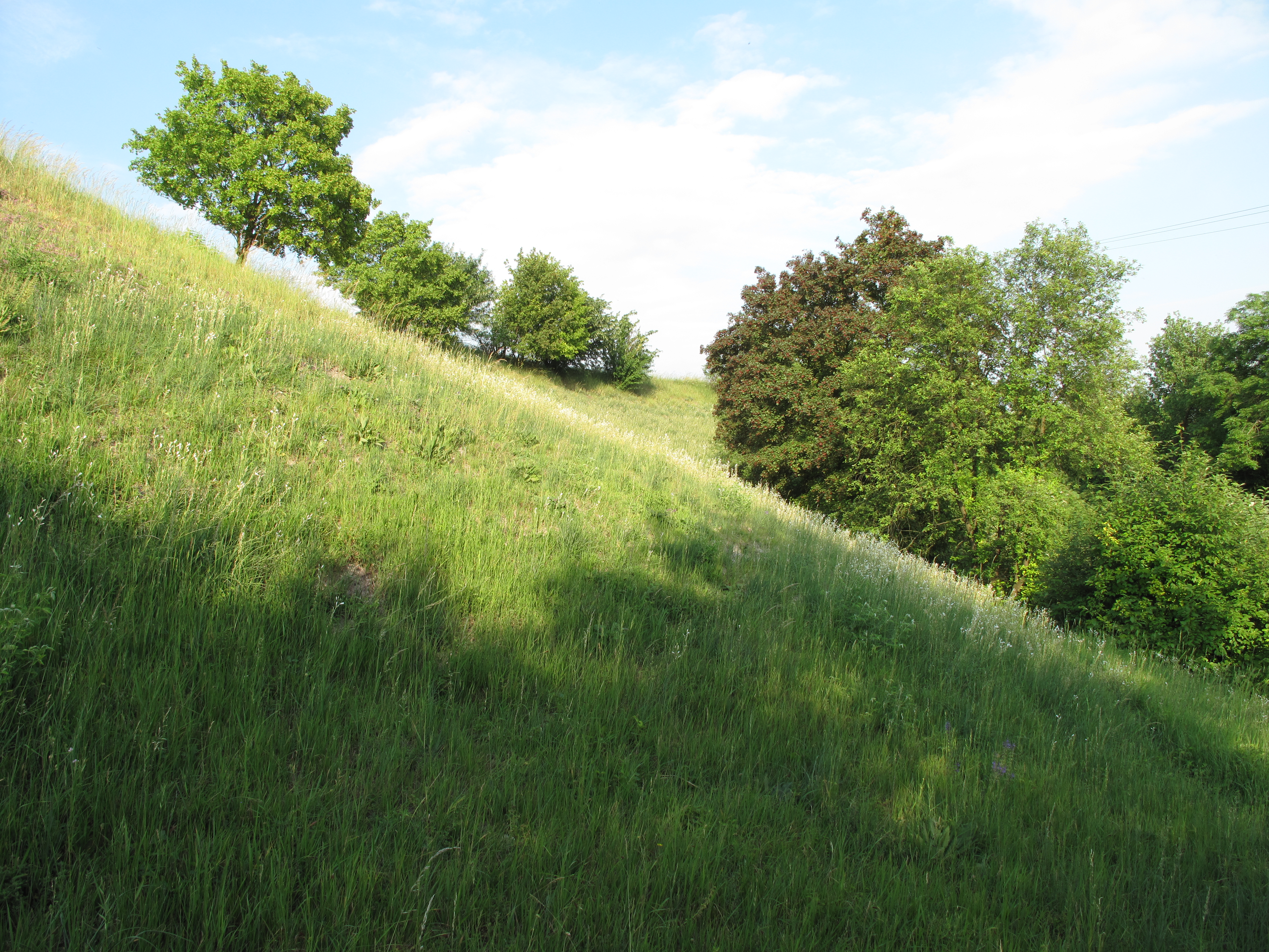 Přírodní památka Vinný vrch. Okres Nymburk, Česká republika.